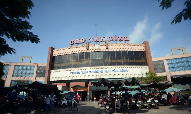 Cổng chợ Tân Bình